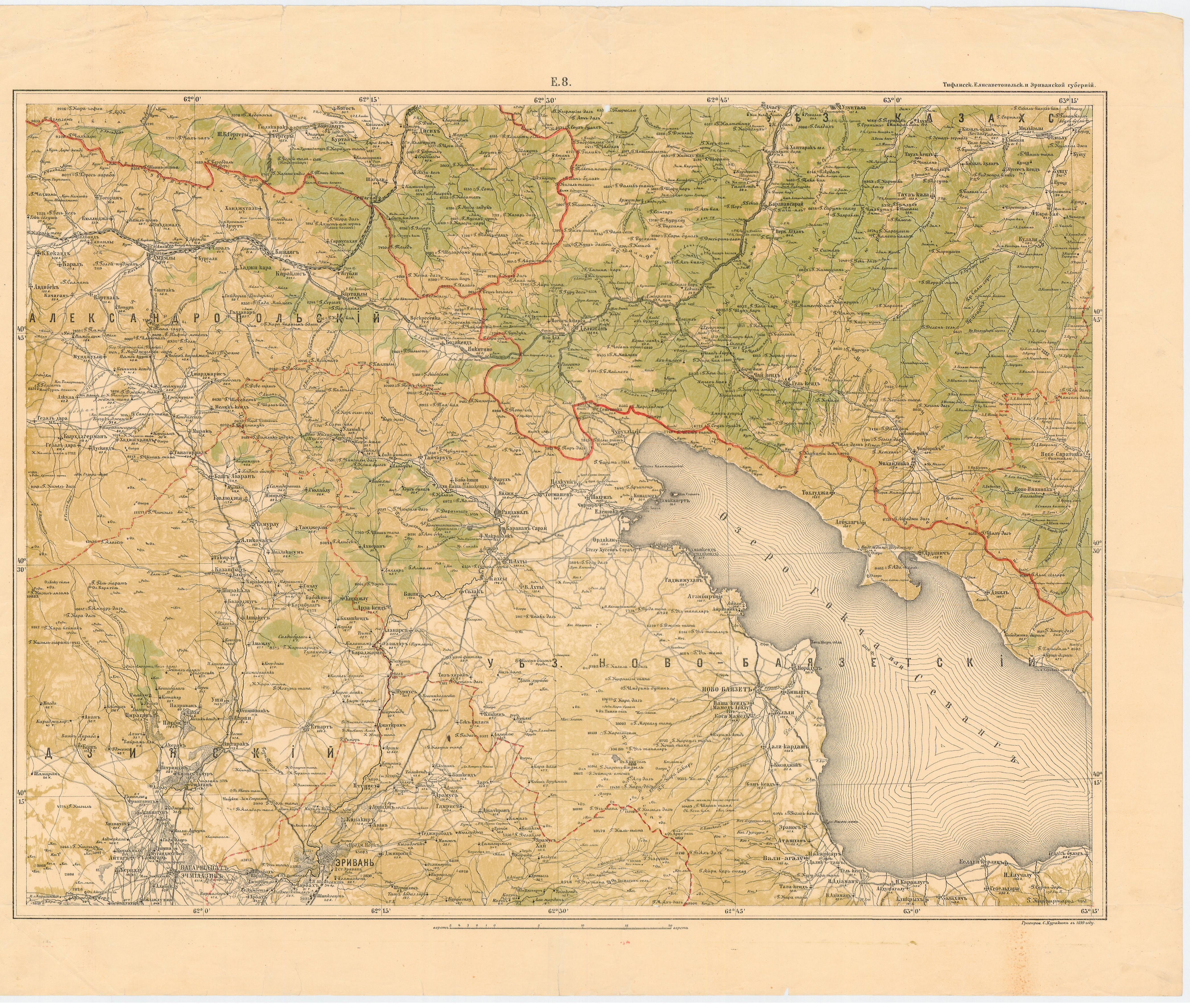 Военно-топографическая карта Кавказского края - лист E. 8. (1877)